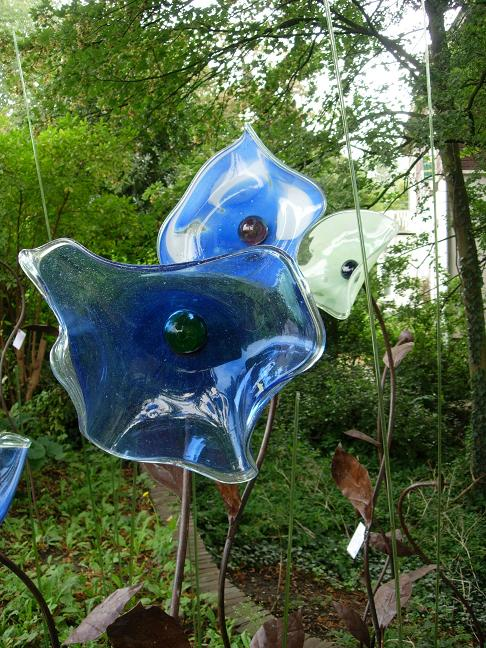 Zicht op een deel van de collectie van het Nationaal Glasmuseum